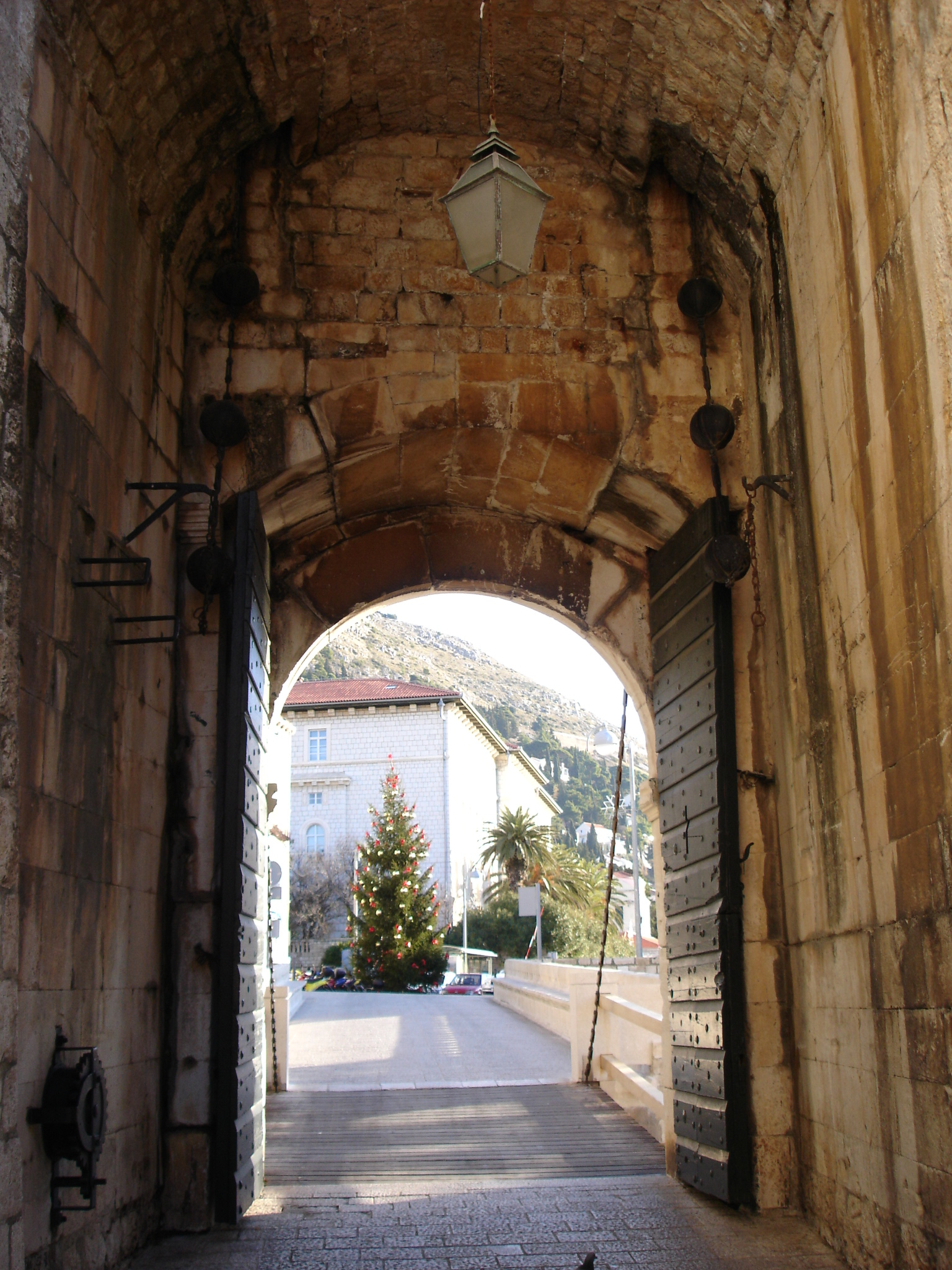 Dubrovnik, vrata Ploče.